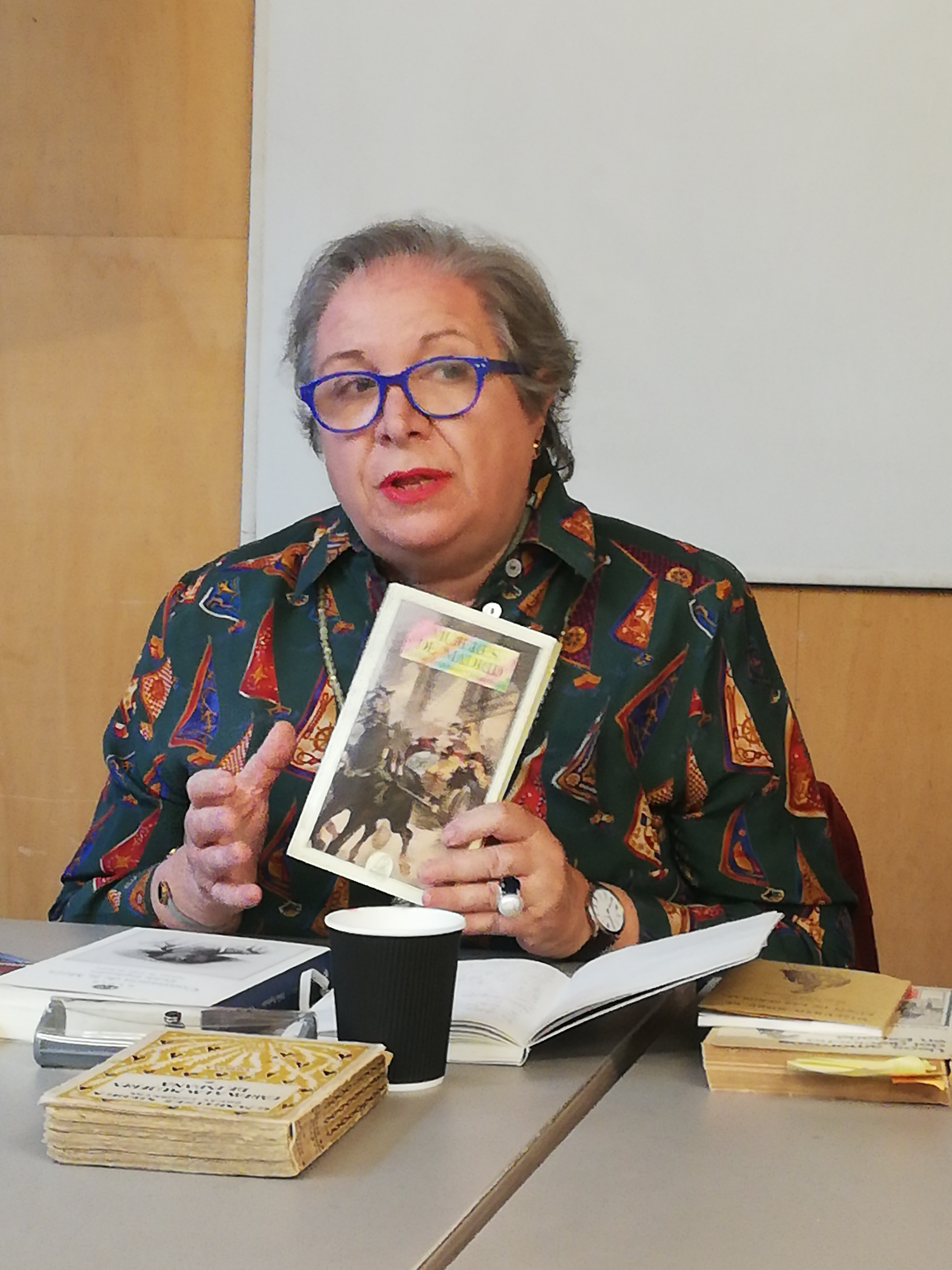 La historiadora Paloma Fernández-Quintanilla en un conversatorio del grupo Cuarto Propio en Wikipedia sobre mujeres de Madrid celebrado en Medialab-Prado (Madrid)